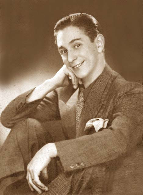 O ator cômico brasileiro Oscarito